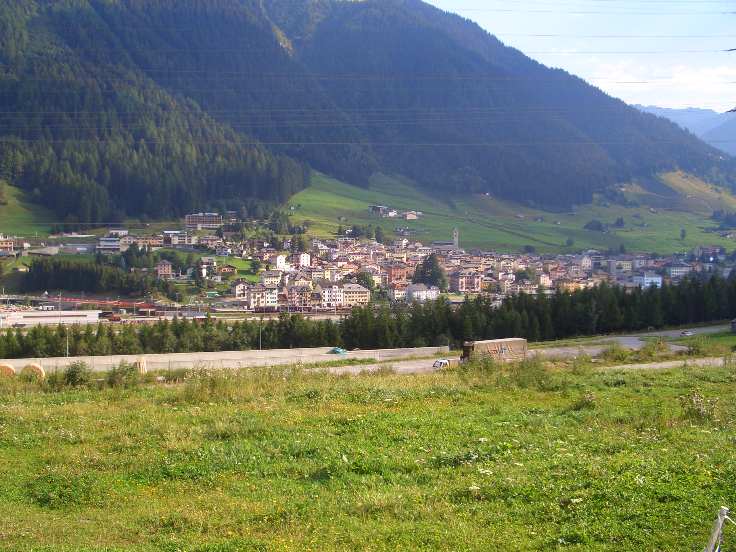 Foto der Schweizer Gemeinde Airolo